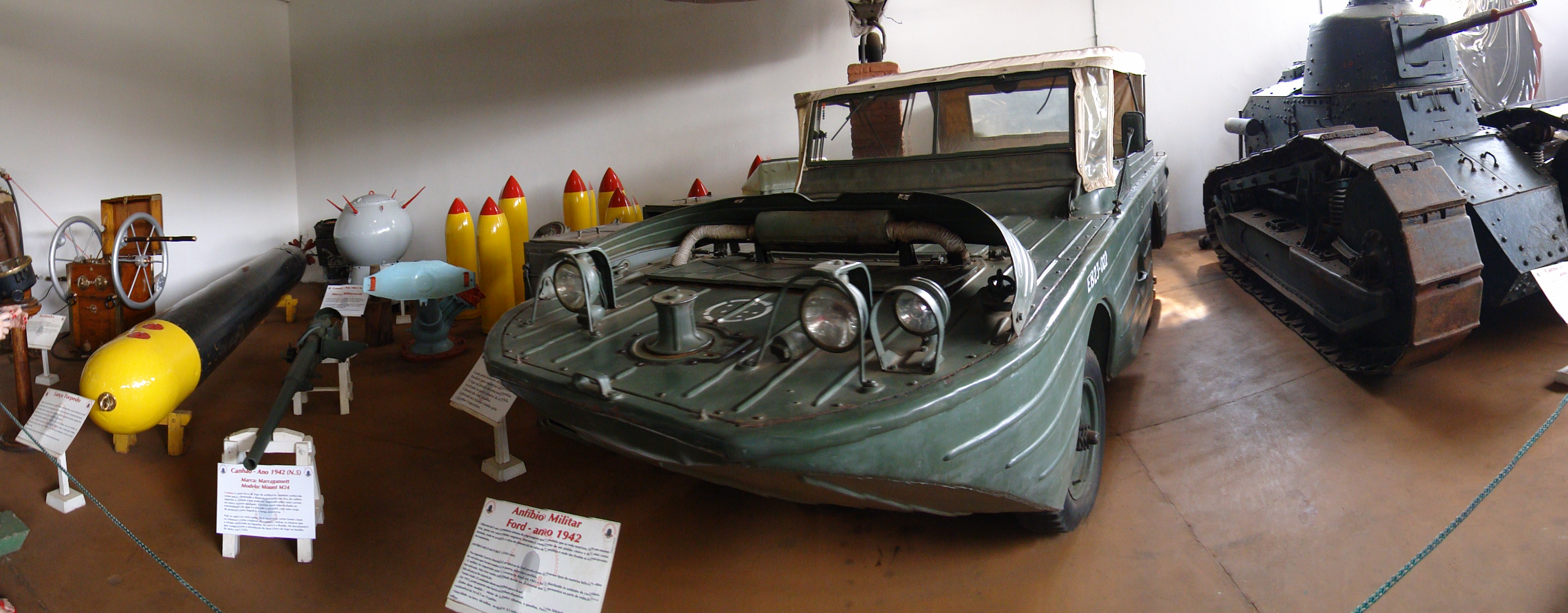 museu de bebedouro 06-09-2010 12-38